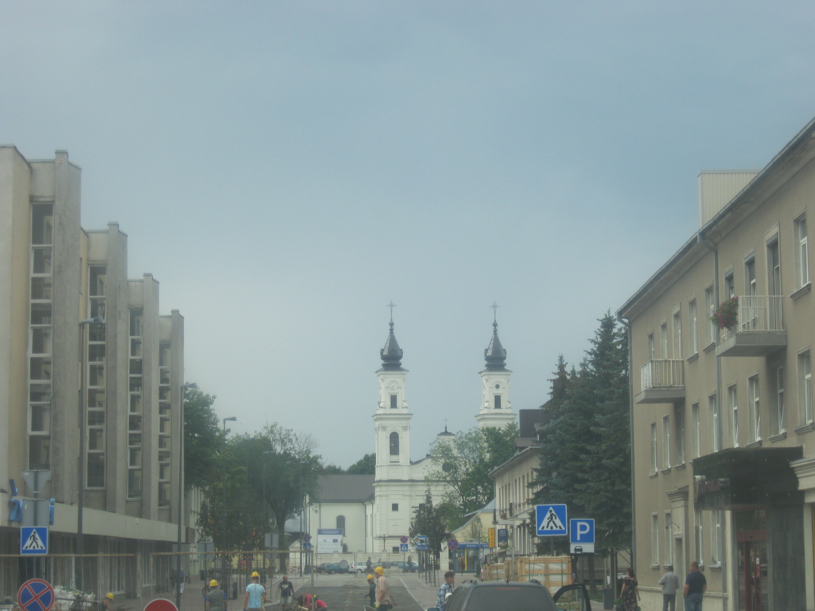 Marijampolė